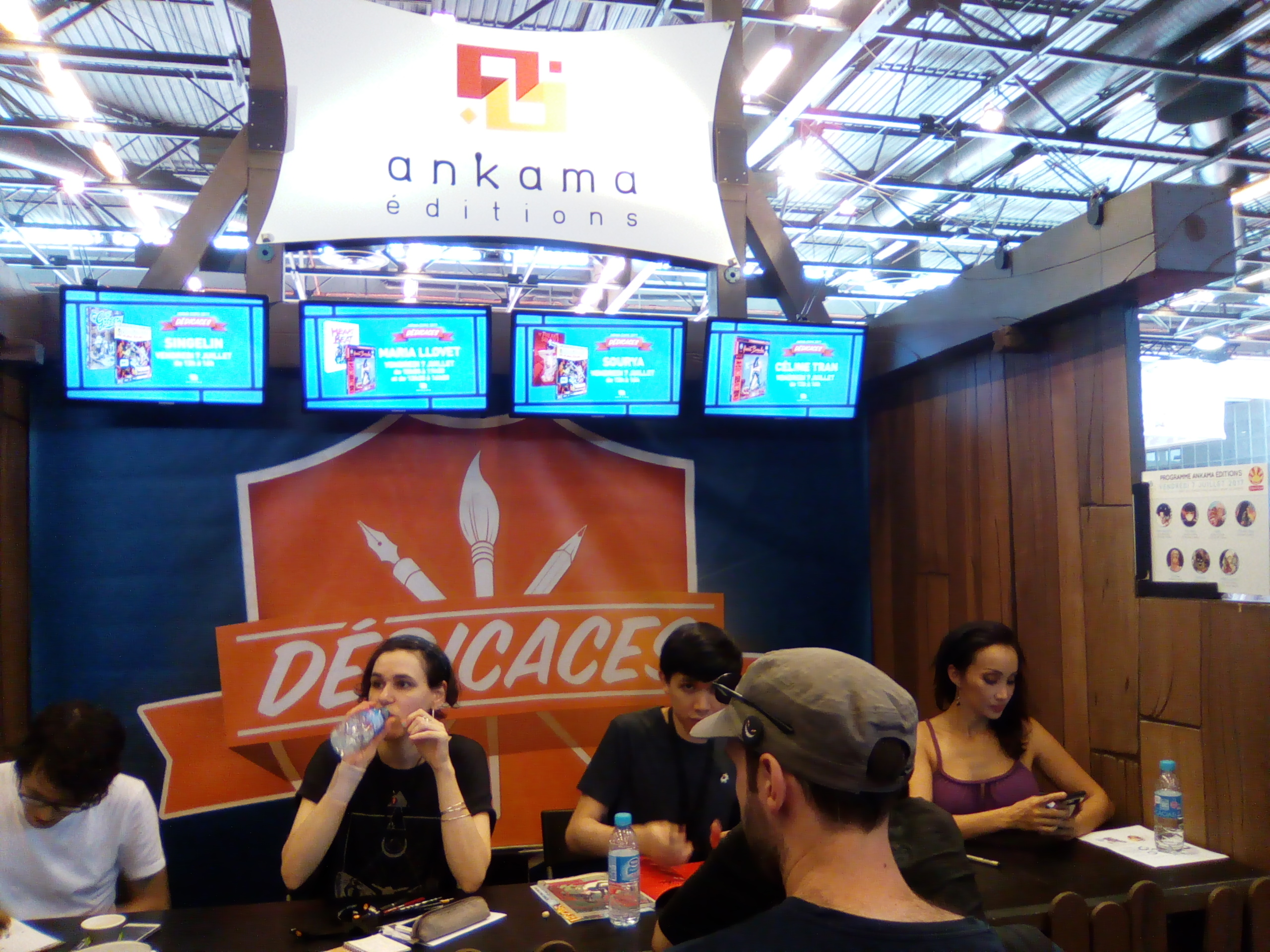 Stand d'Ankama Éditions à la Japan expo 2017. De gauche à droite : Guillaume Singelin, Maria Llovet, Sourya, Céline Tran.